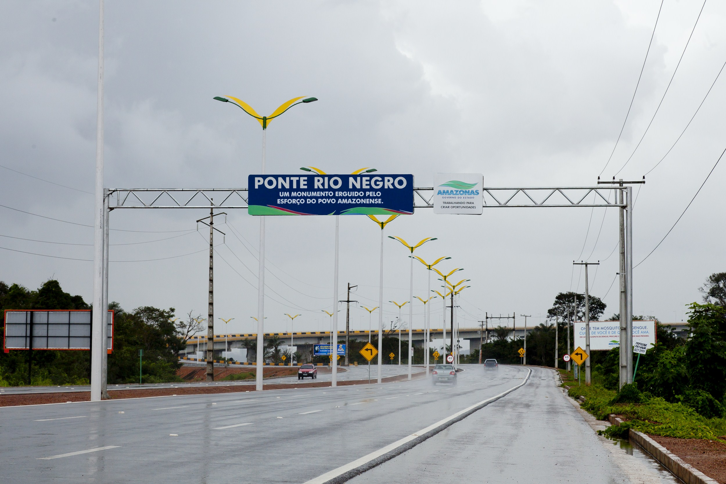 Rodovia AM-070 que dá acesso à Manaus através da Ponte Rio Negro.